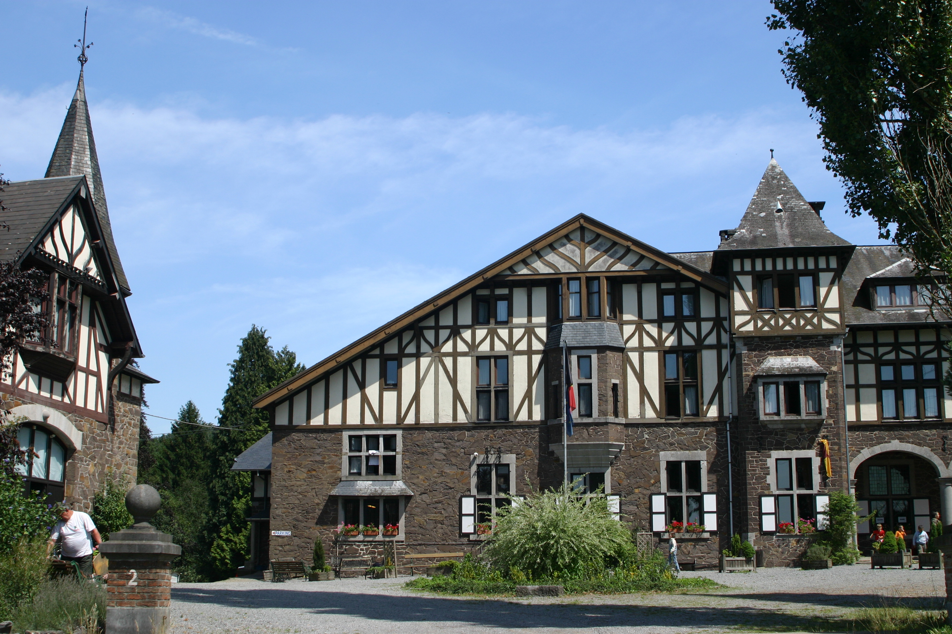 Schlass vun Insegotte.